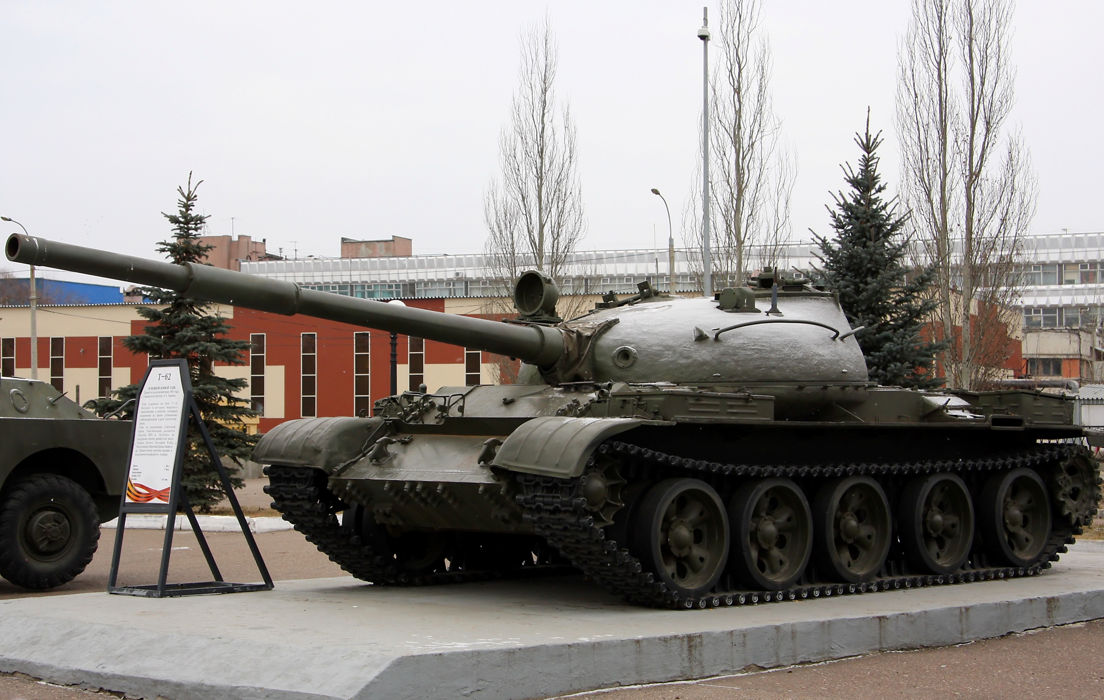 T-62